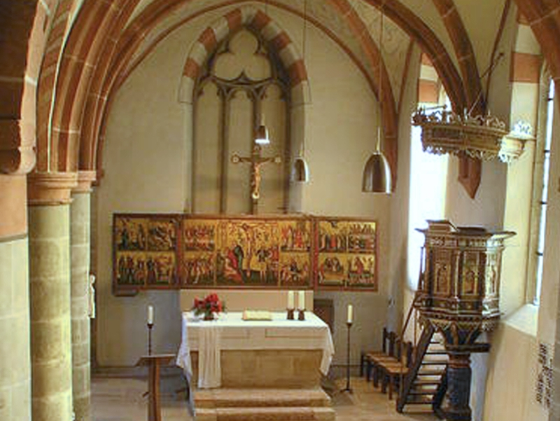 Gotischer 3-teiliger Flügelaltar